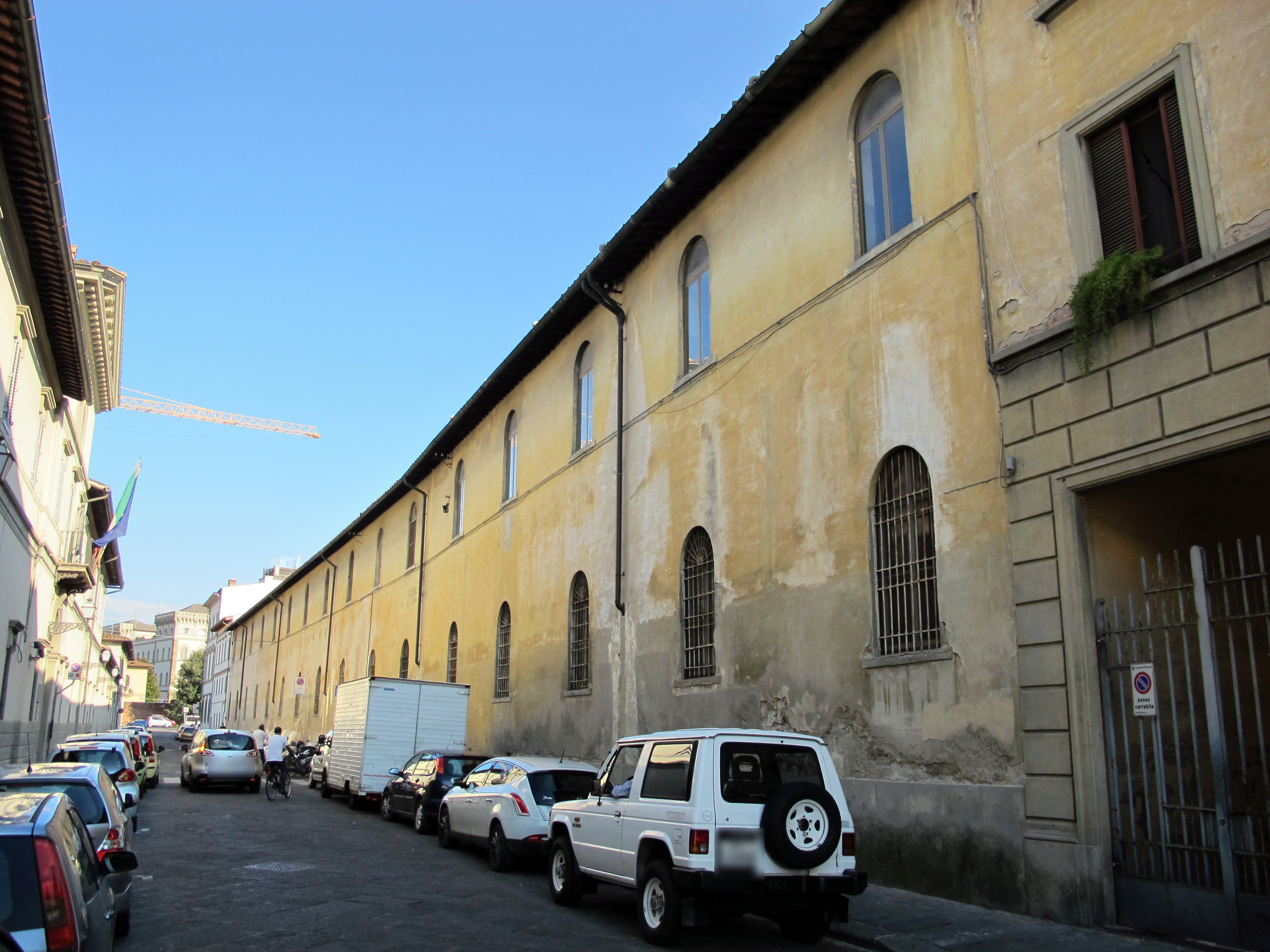 Firenze